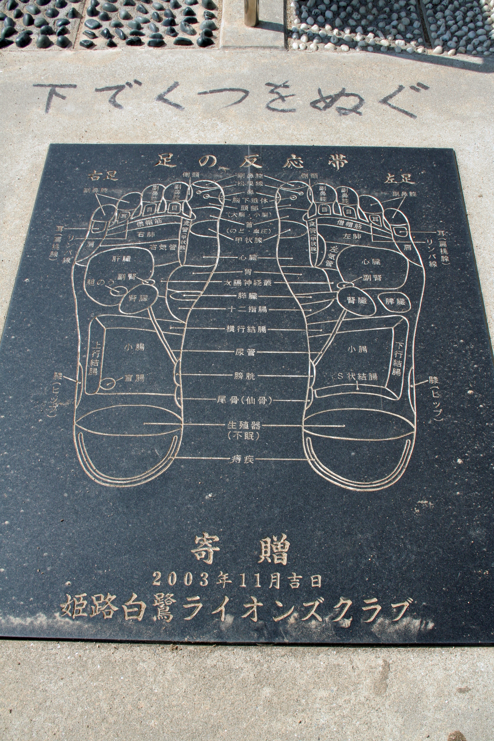 兵庫県姫路市御立西の夢前川東岸にある公園「御立交通公園」の写真。 健康歩道にある足のツボを記した石板。